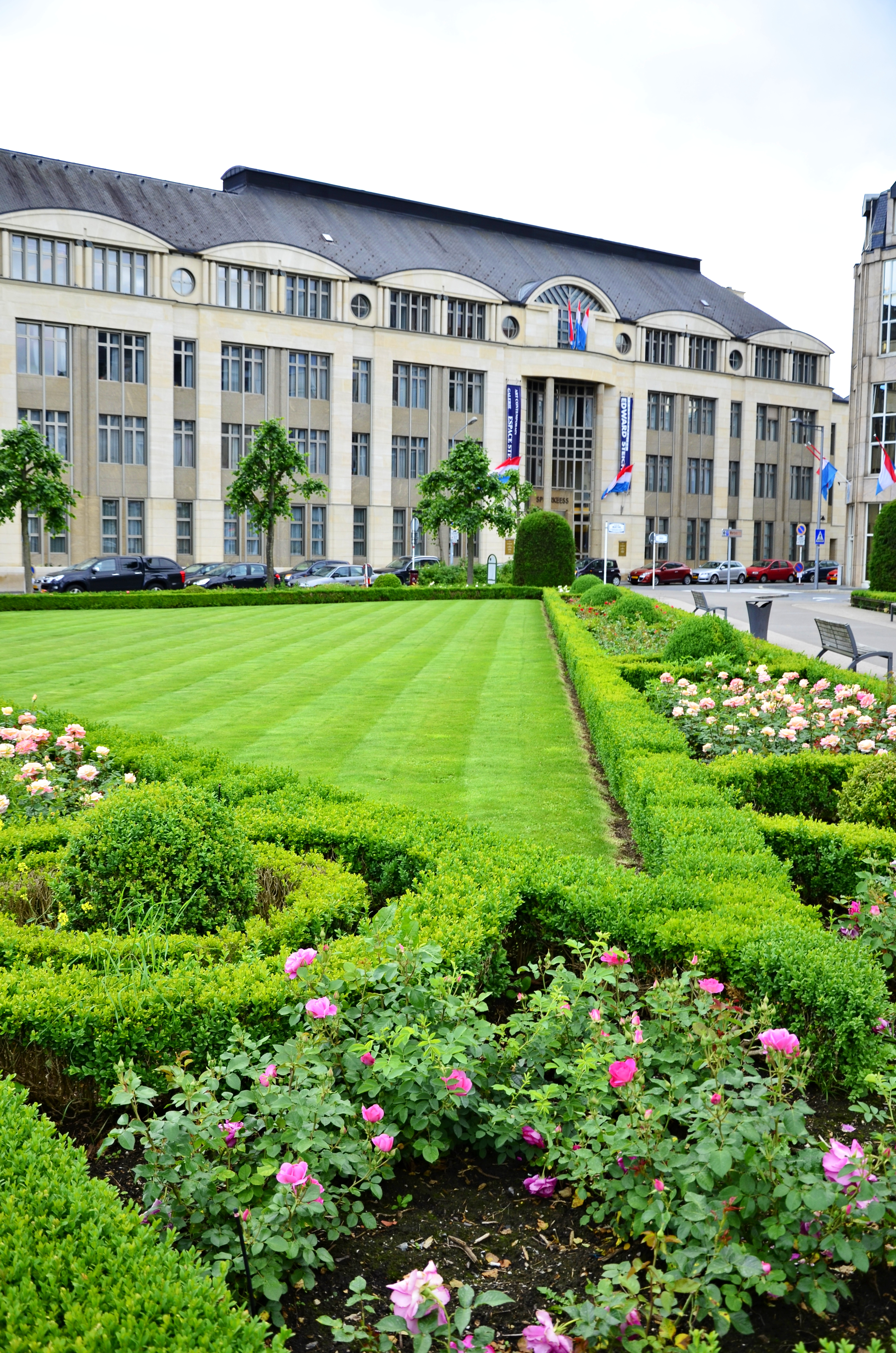 Luxembourg Capital City. Place des Martyrs ("Rousegäertchen")